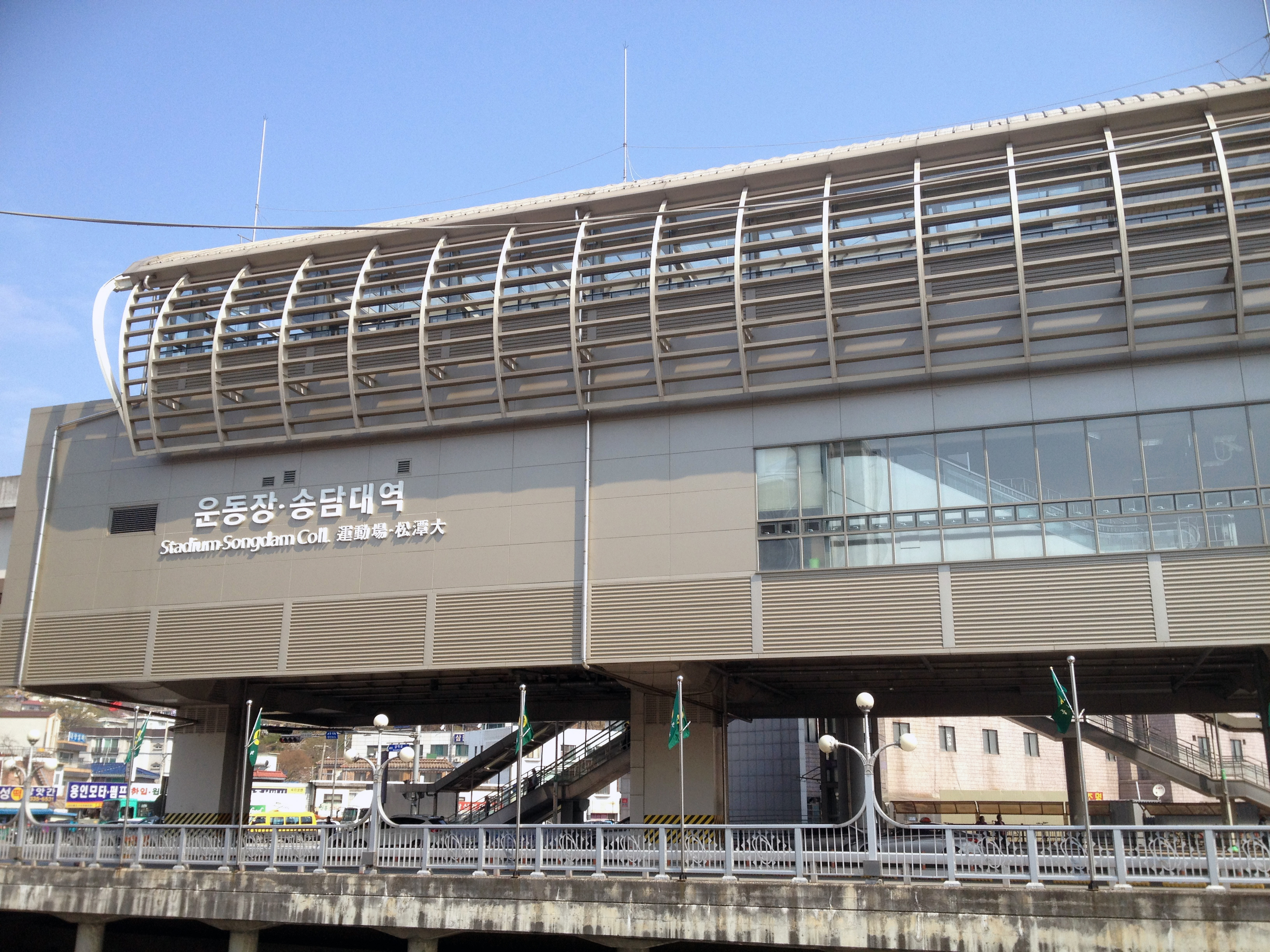 운동장송담대역 역사